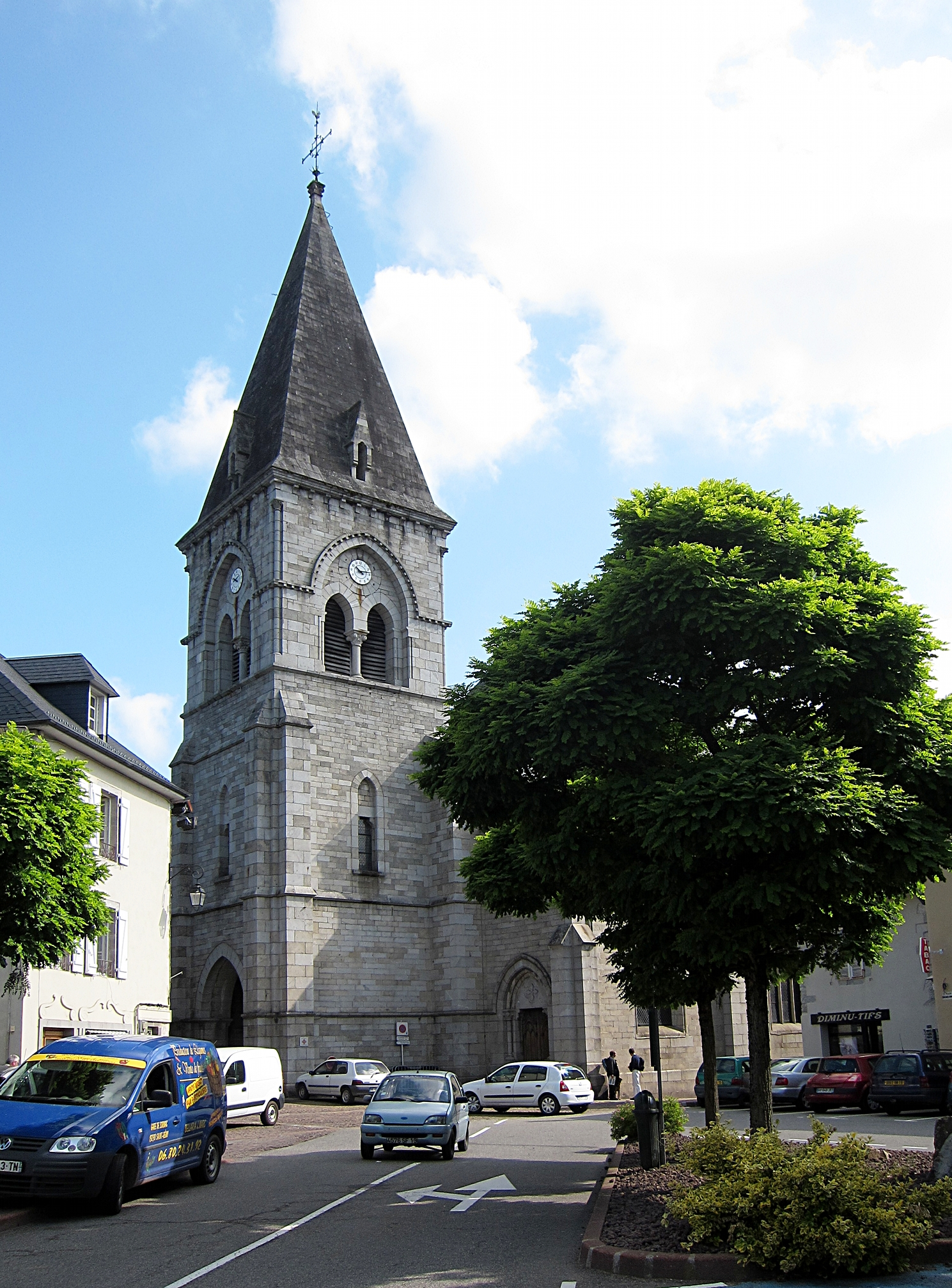 L'église Saint Martin d'Ussel (Corrèze).